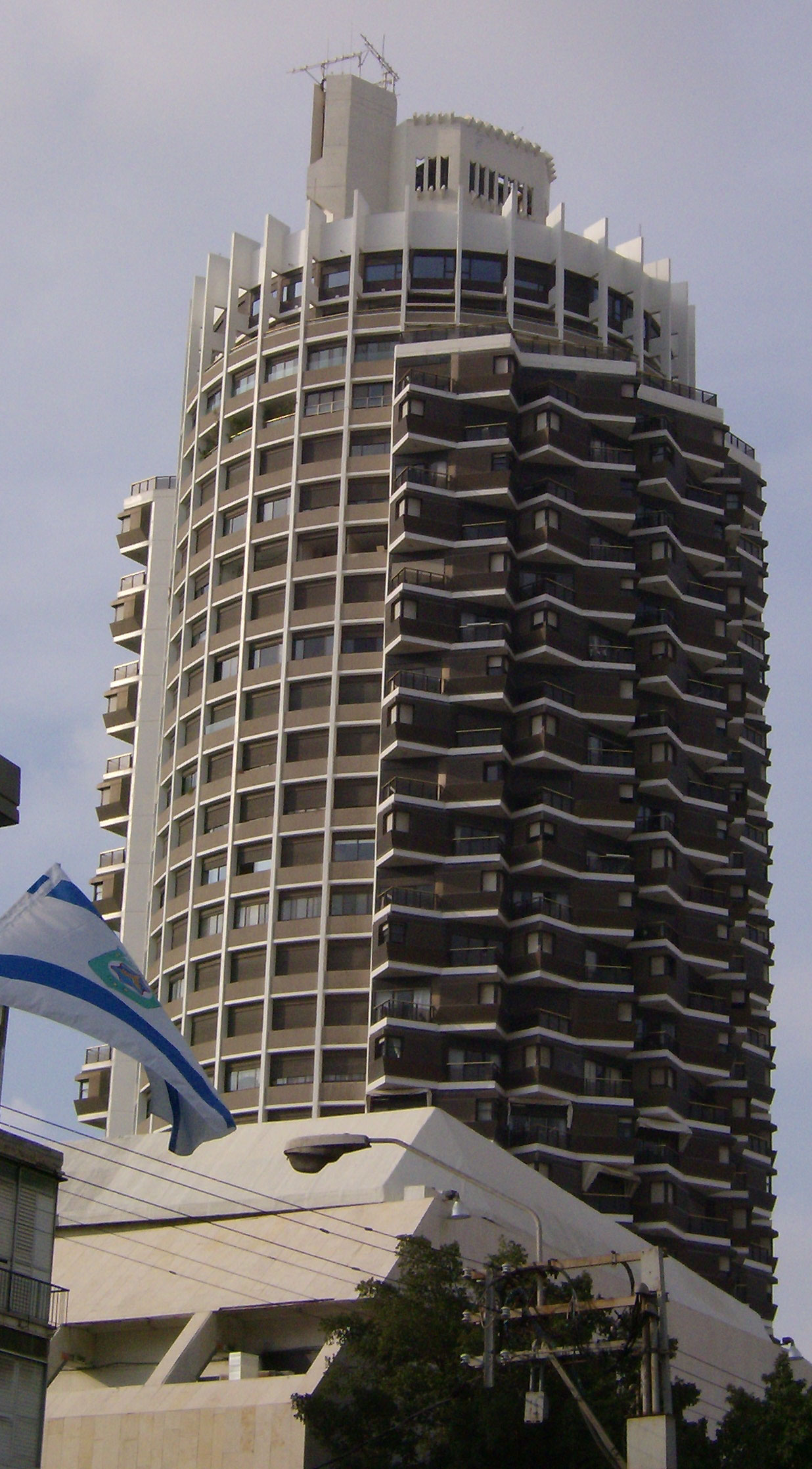 The Dizengof tower, Tel Aviv, Israelמגדל דיזינגוף, תל אביב